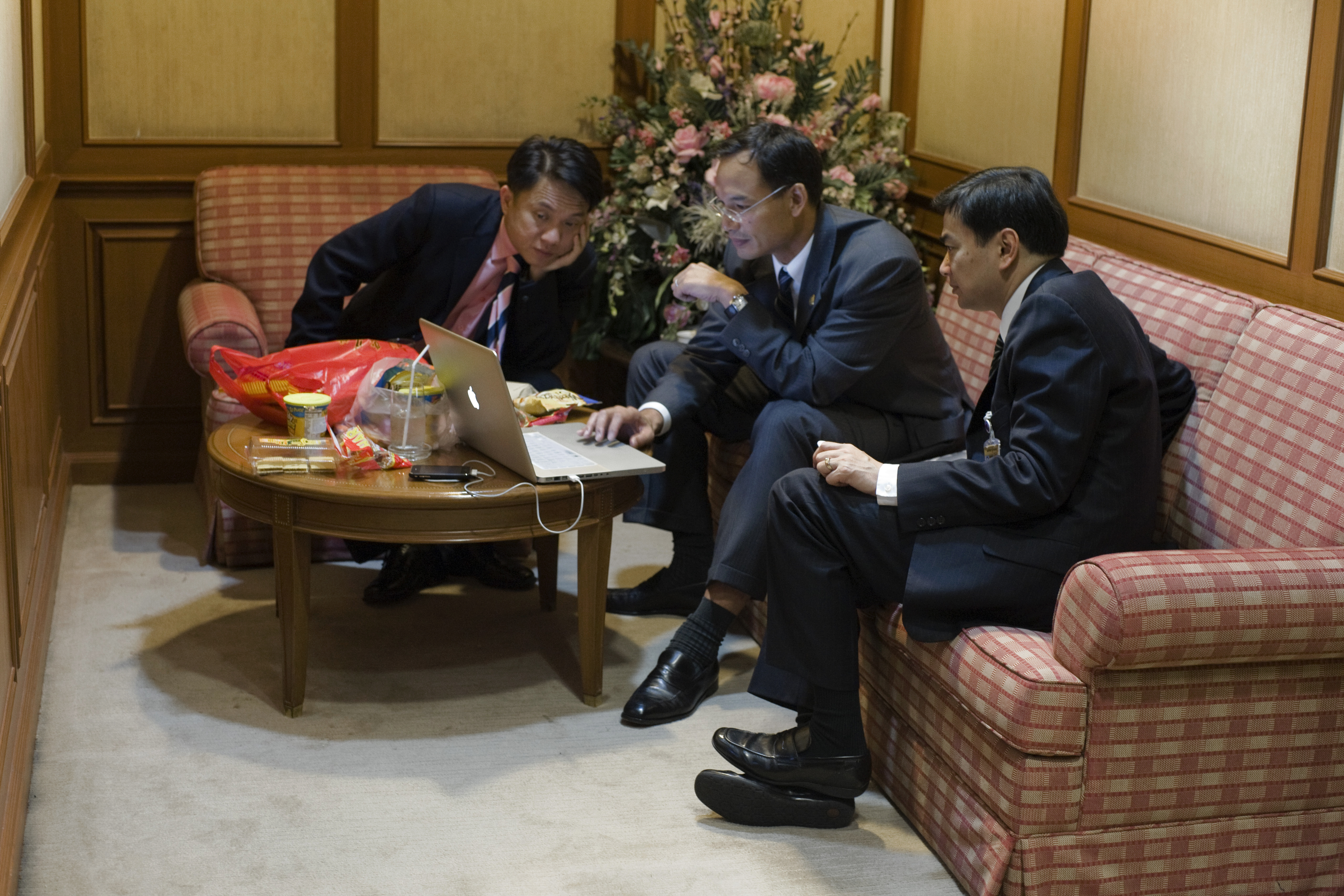 (Do) ดู YouTube นายกรัฐมนตรีฟังการประชุมเกี่ยวกับงบประมาณปี พ.ศ.2554 ณ ห้องนายกรัฐมนตรี อาคารรัฐสภา เวลา 2:14น. วันศุกร์ ที่ 20 สิงหาคม พ.ศ.2553 (Photographer attached to the Prime Minister of the Kingdom of Thailand : Peerapat Wimolrungkarat / พีรพัฒน์ วิมลรังครัตน์)